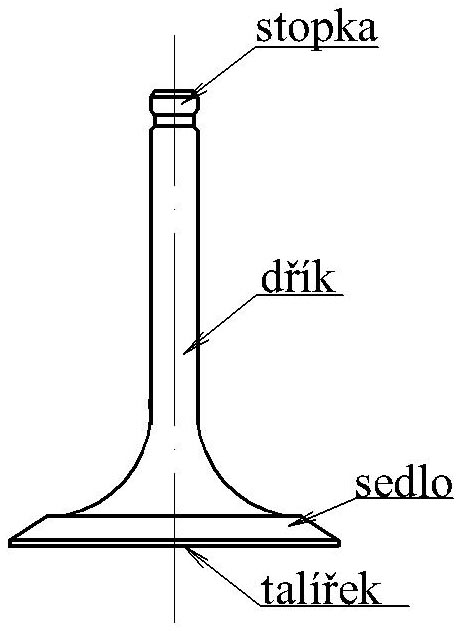 Schéma talířového ventilu motoru s českým popisem.